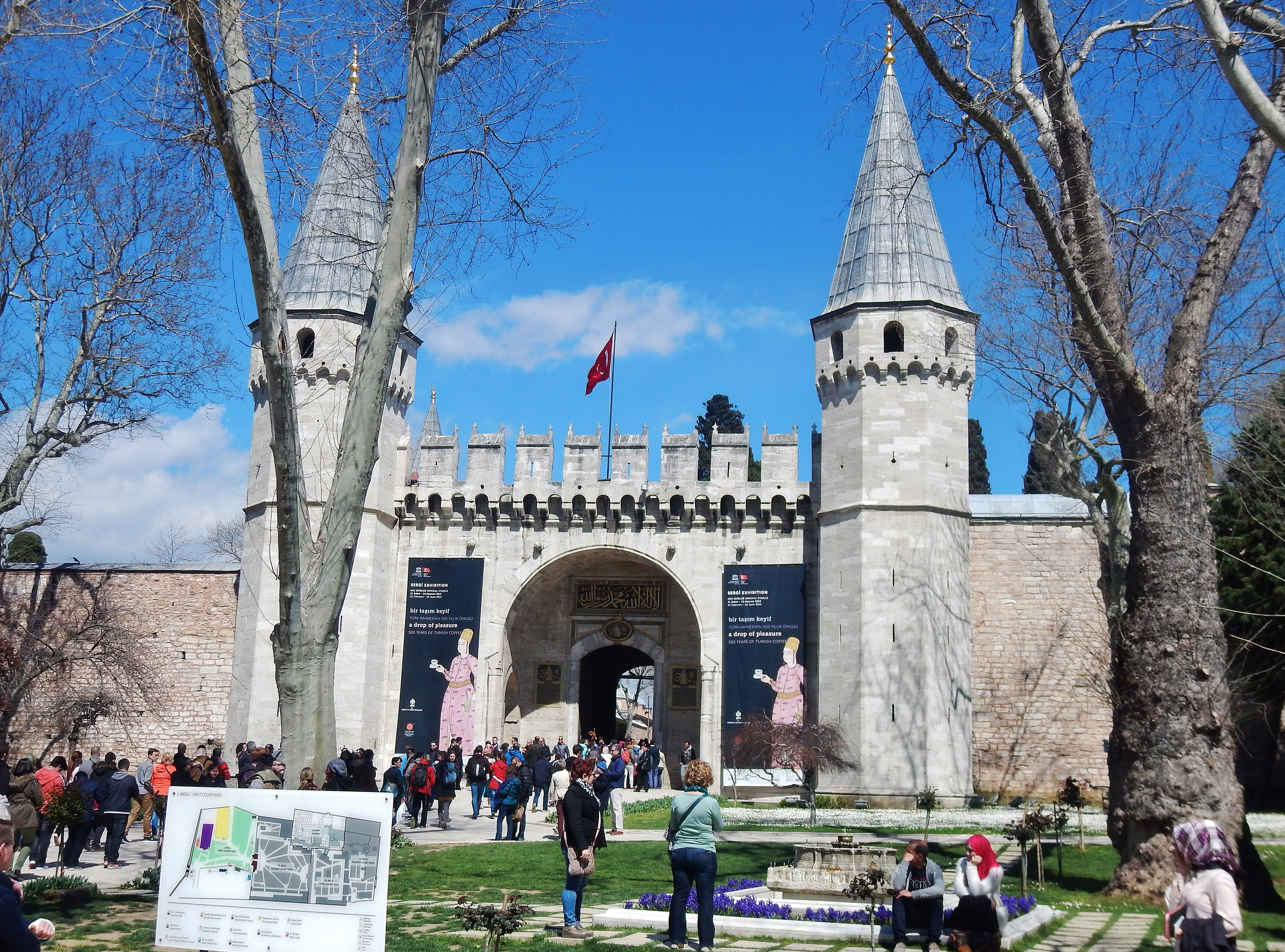 Topkapı Sarayı, Topkapi Palace